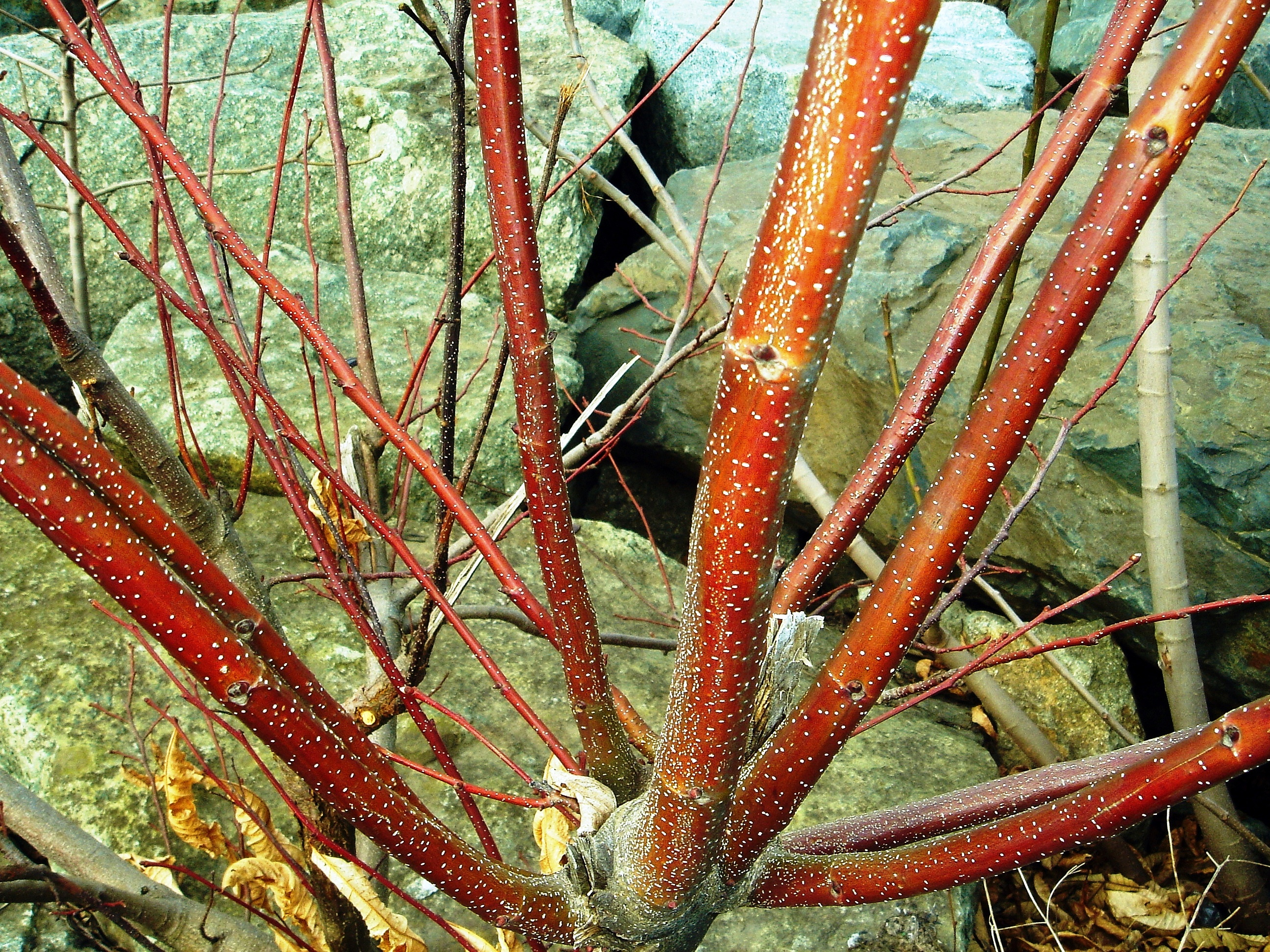 Anadolu kestanesi (Castanea sativa)